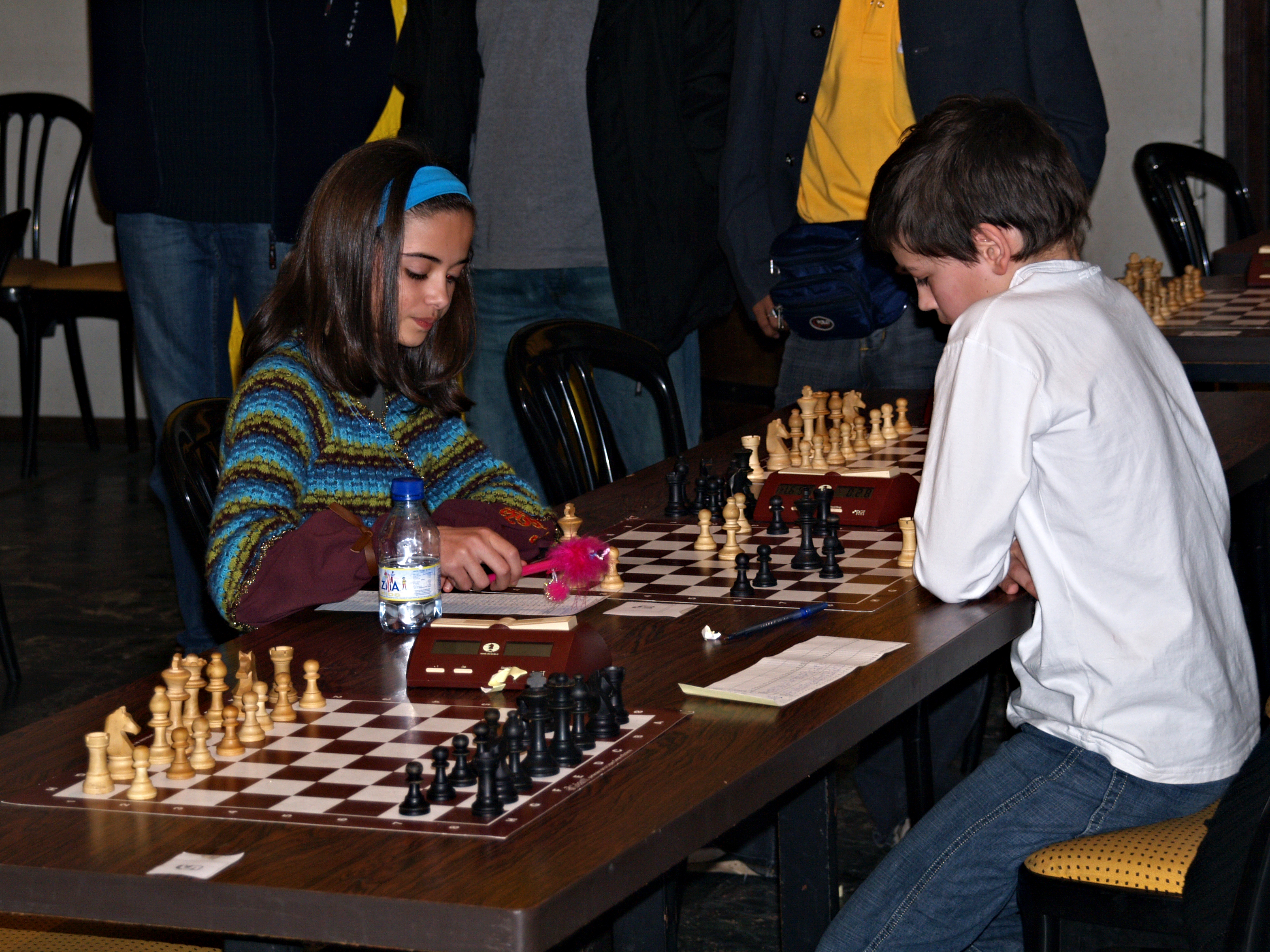 Calvi (Corse) - Participants au tournoi d'échecs des Jeunes, parallèle au 4e Open international de Balagne (2007)